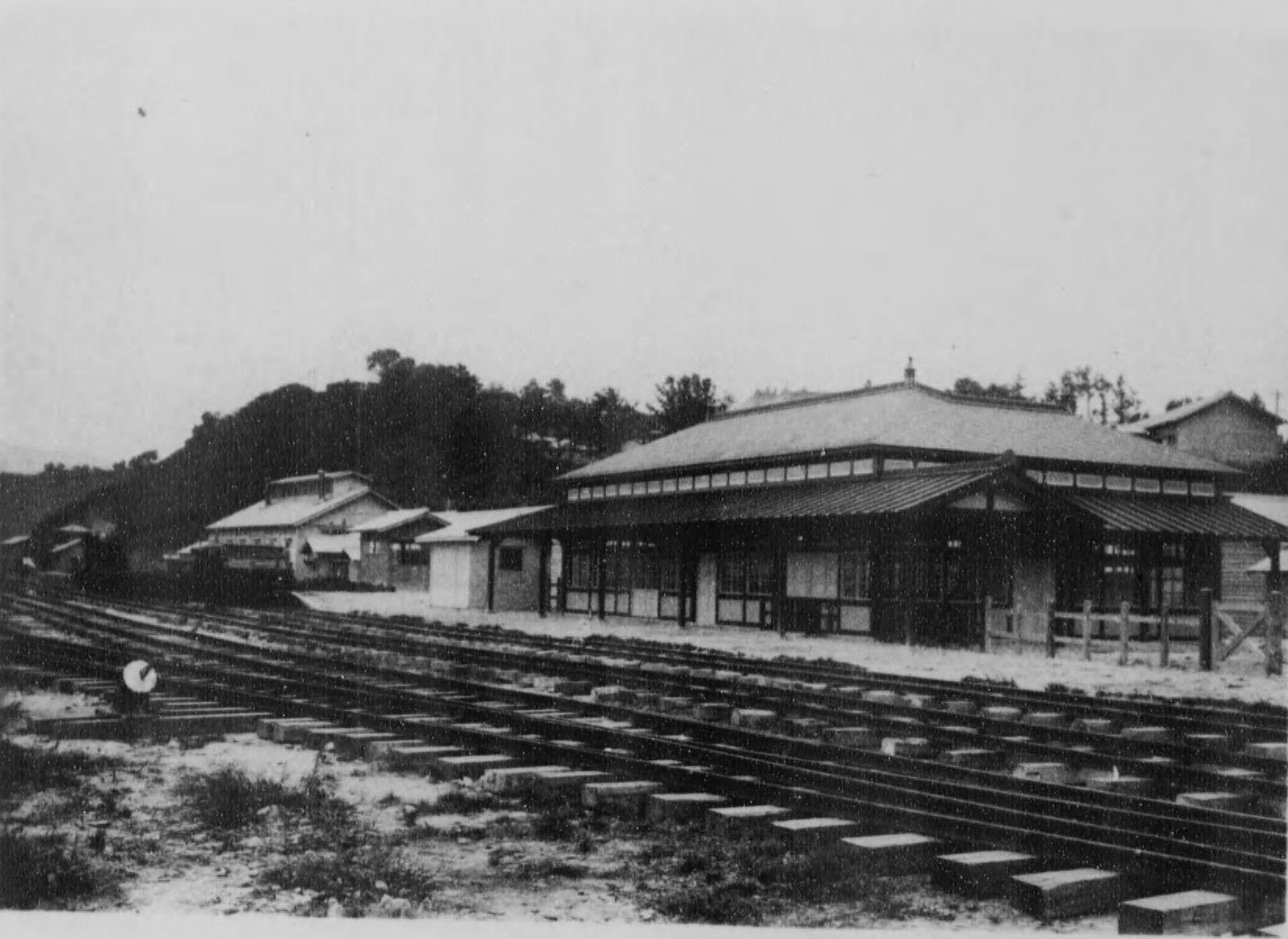 大正10年当時の増毛駅